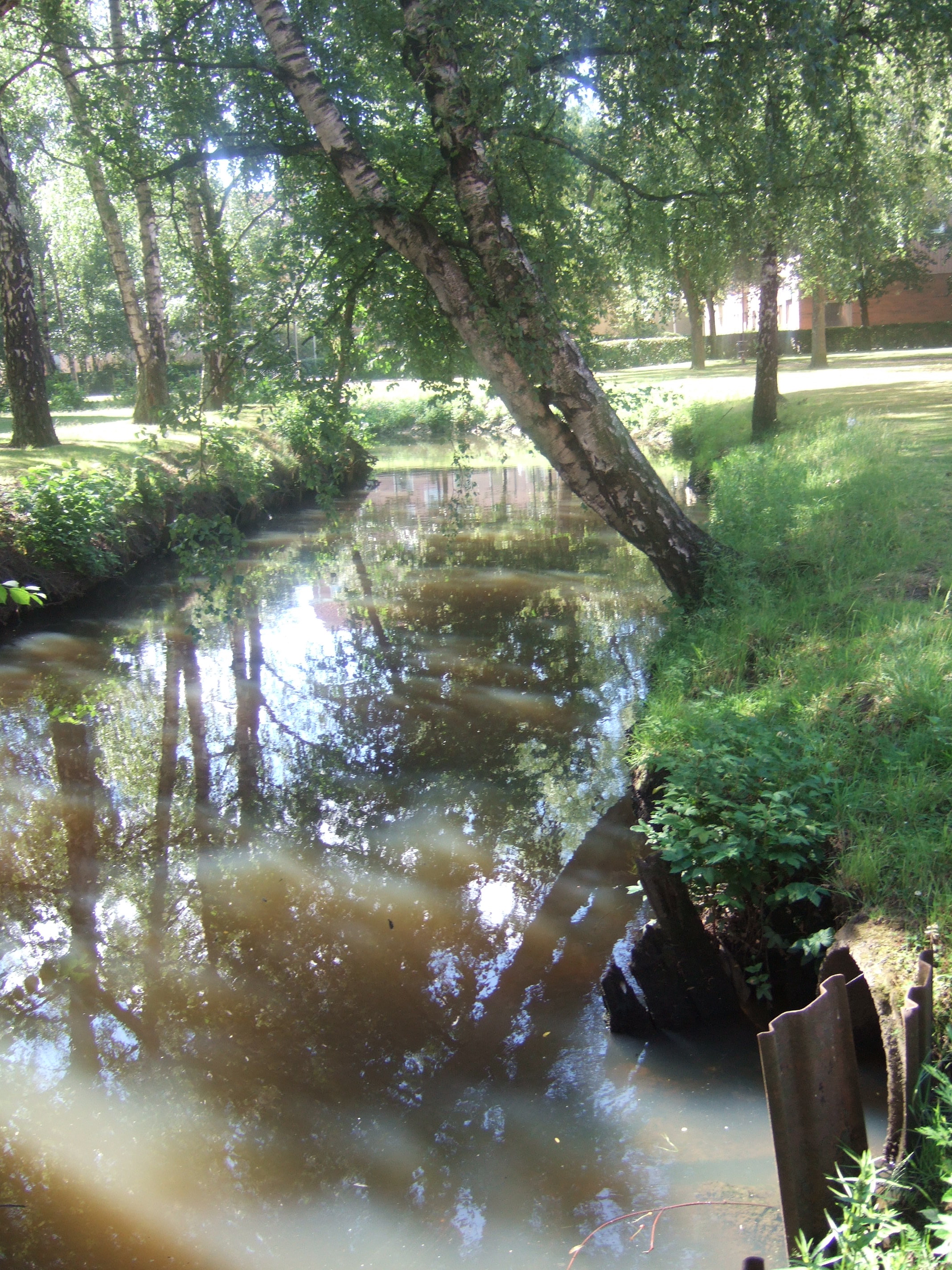 Kvillebäcken på Hisingen, Göteborg, Sverige (Sweden)